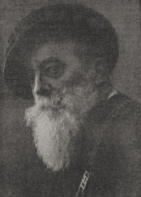 Der Verfasser des Festspiels "Hollands Blütezeit" Maler Eduard Daelen als Rembrandt, 1912. Foto Atelier Elite, Düsseldorf